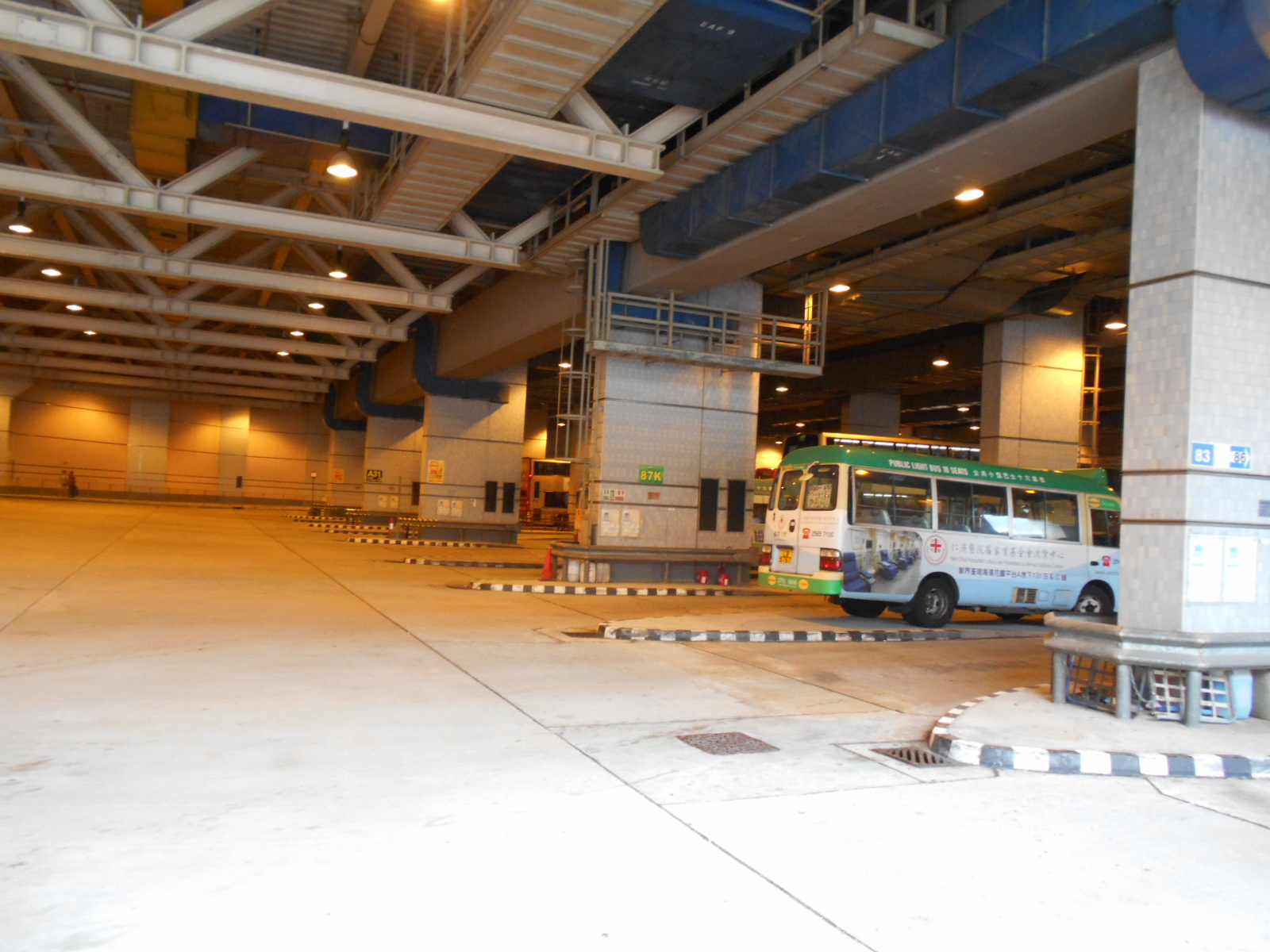 中文（香港）: 荃灣如心廣場公共交通交匯處(2016年)